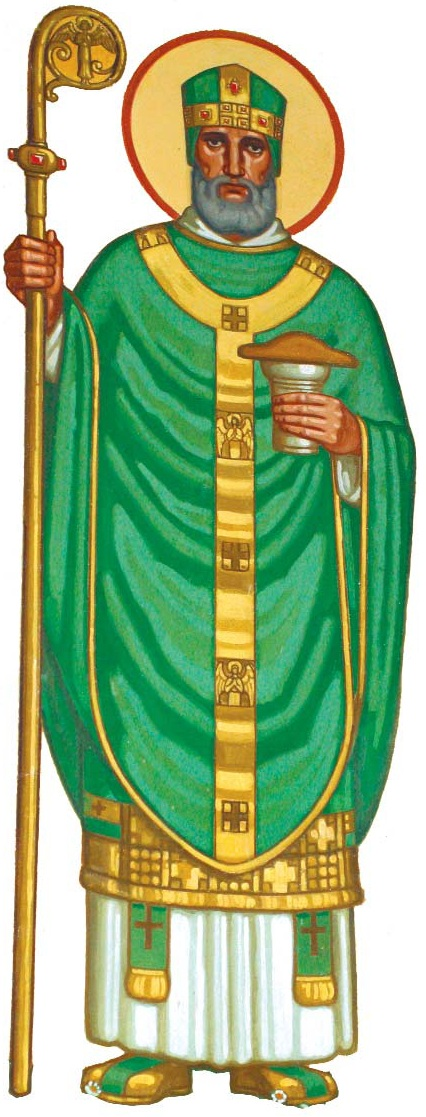 14 Świętych Wspomożycieli z polichromii parafialnego kościoła z wioski Immensee w szwajcarskim Küssnacht